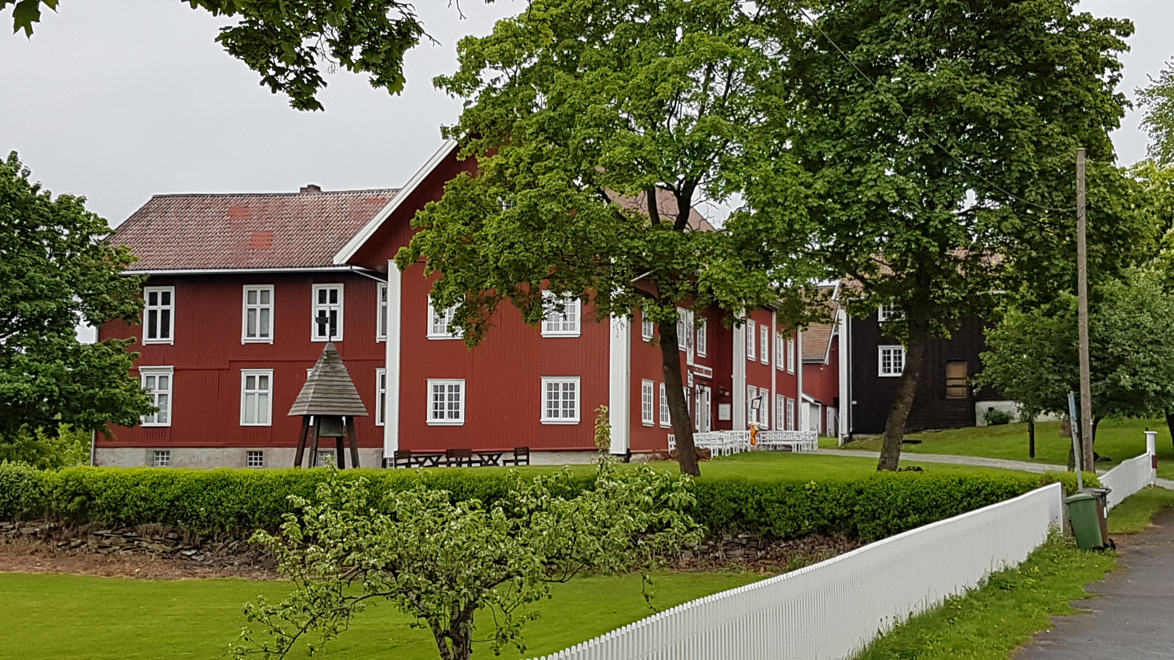 Våningshuset på Norderhov gamle prestegård